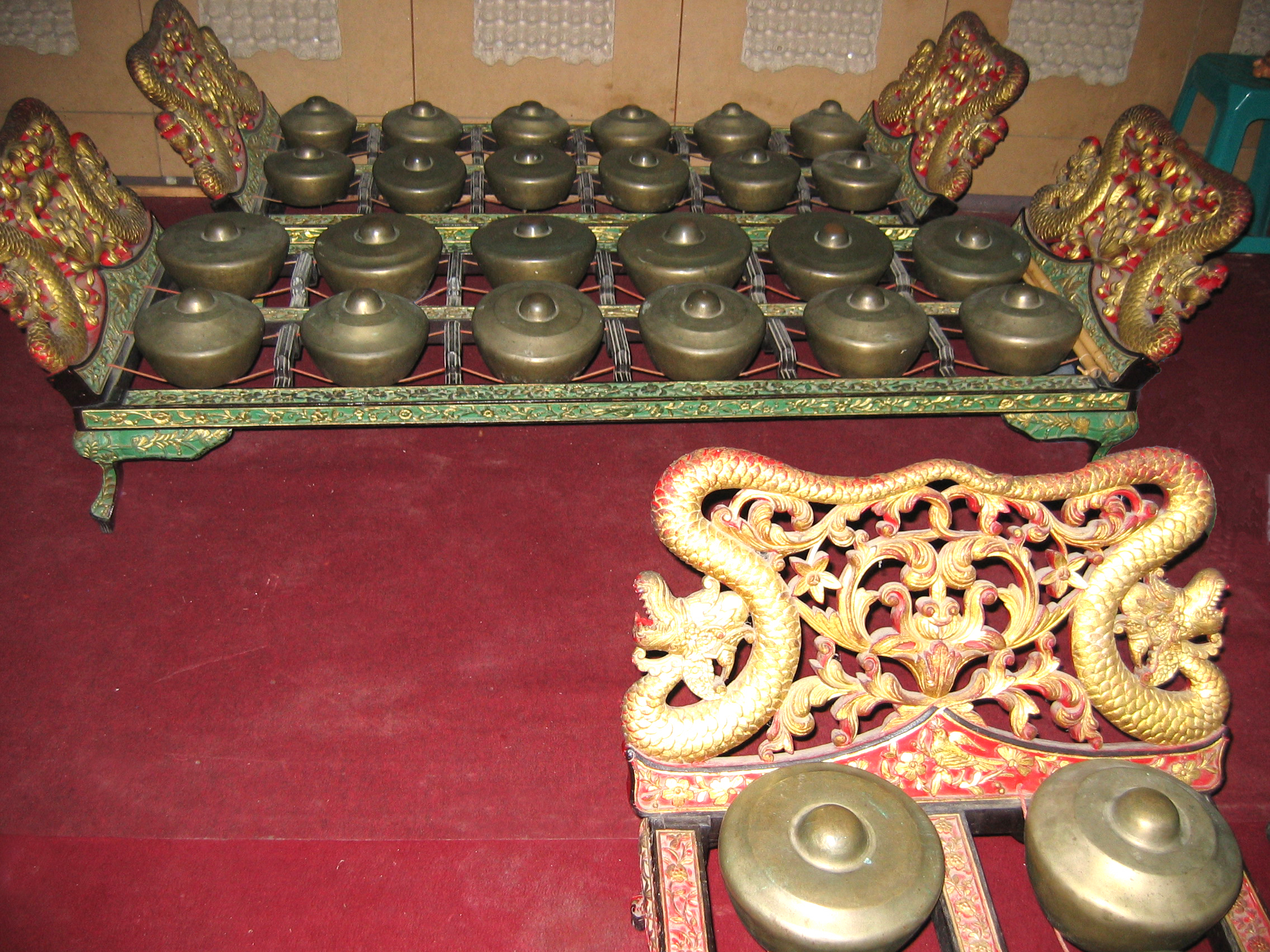 Bonang barung and panerus. STSI Surakarta. Own work 2002 Giovanni Sciarrino